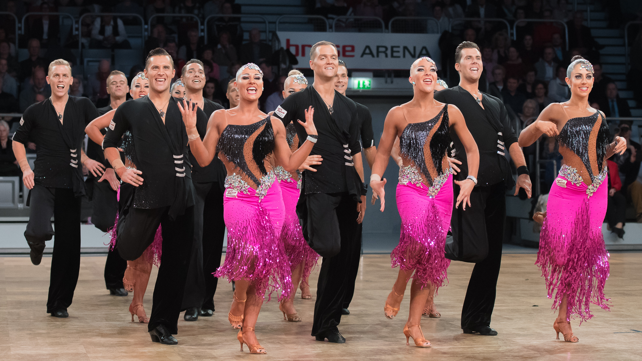 Brose Arena Bamberg,Deutsche Meisterschaften der Formationen Standard & Latein 2016,Grün-Gold-Club Bremen A,Noises,Tanzsport,Voices and Melodies